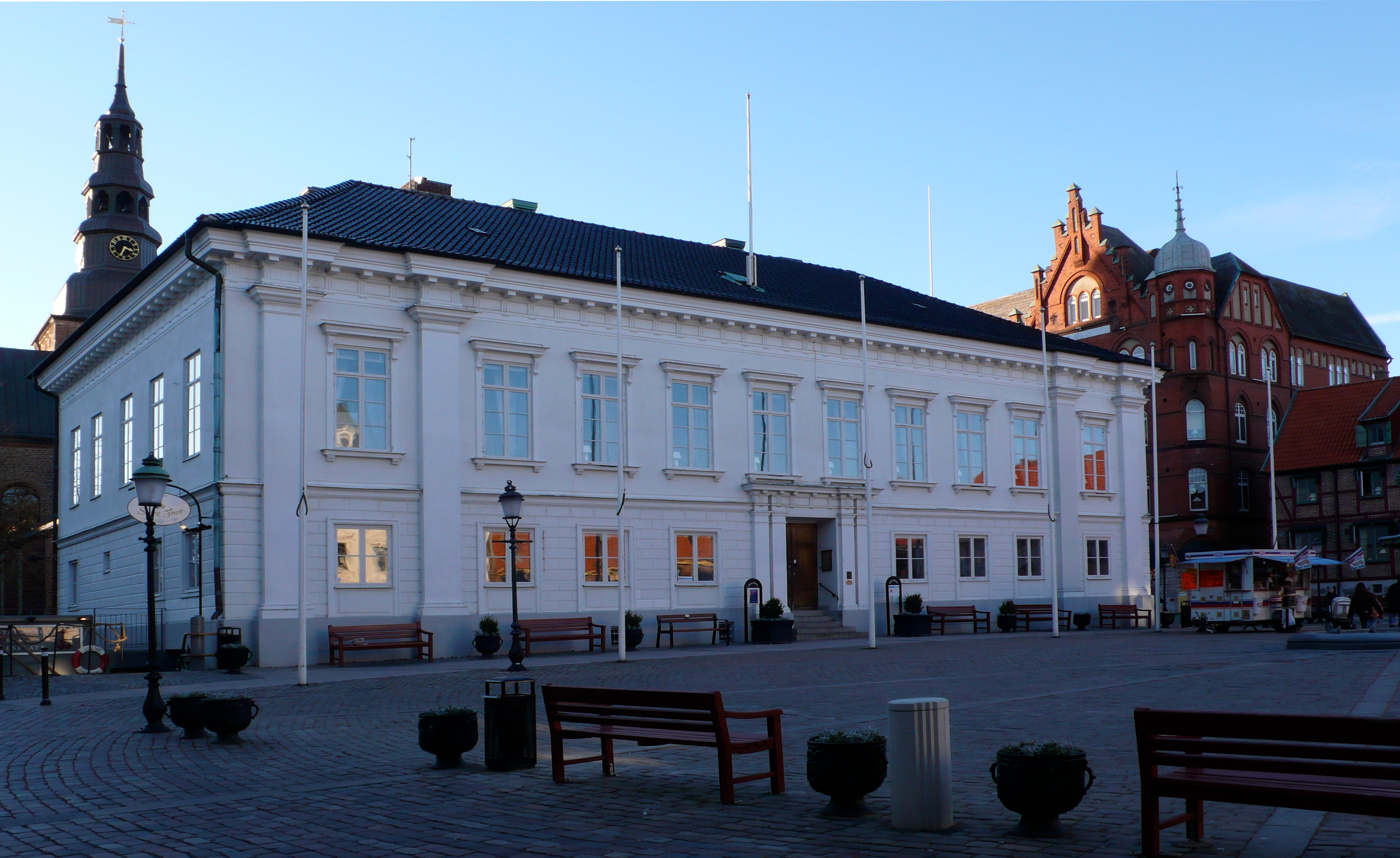 Bearbeitete Version